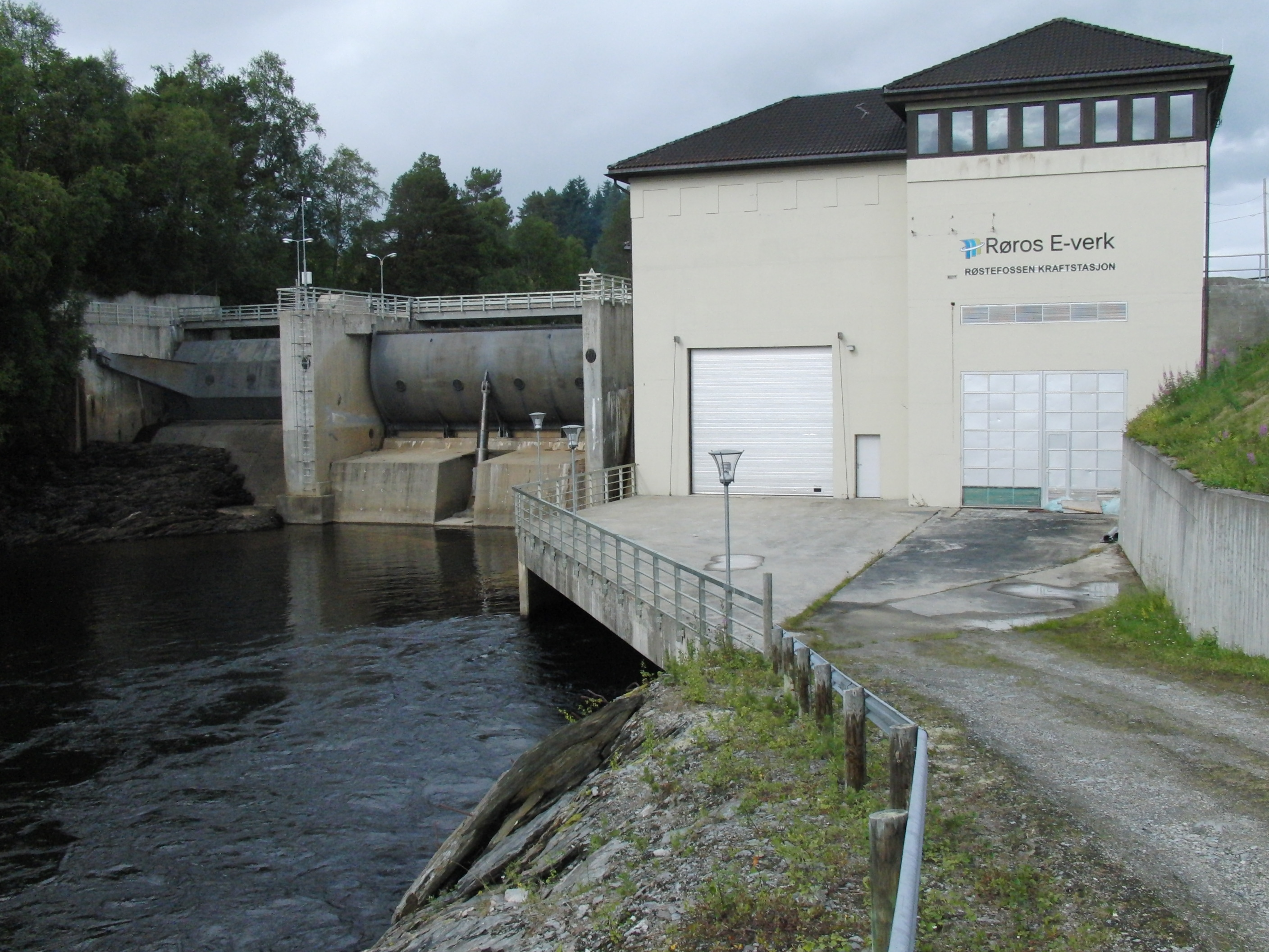 Røstefoss kraftverk